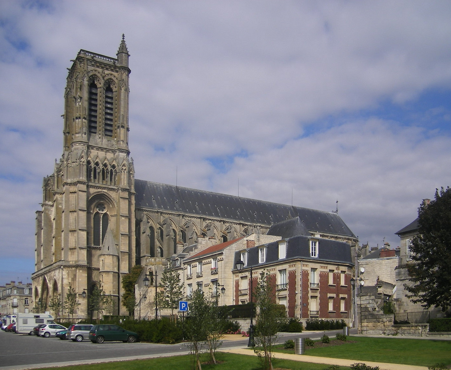 Cathédrale Saint-Gervais-et-Saint-Protais de Soissons